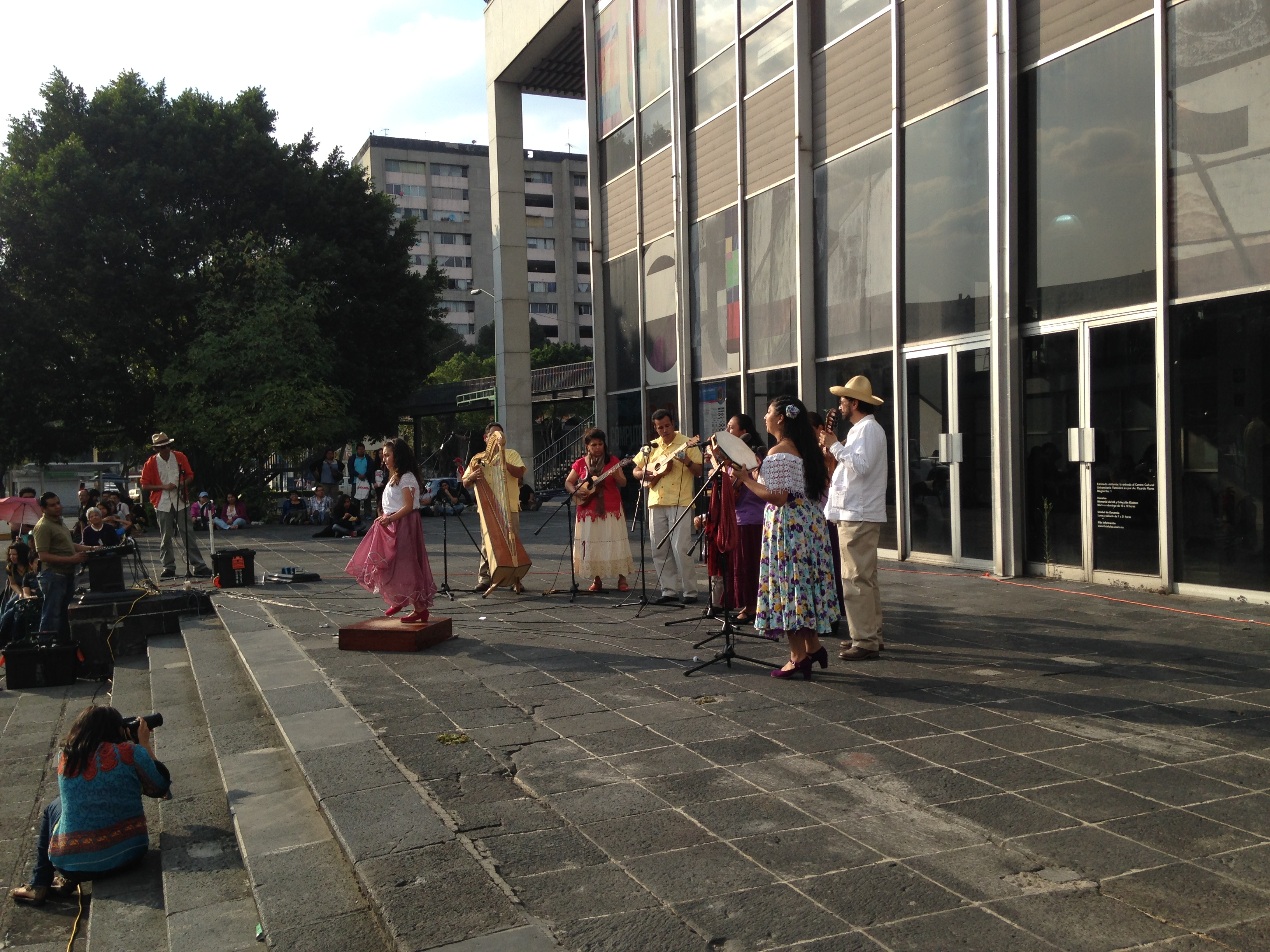 Representación del baile tradicional en el Centro Cultural Universitario Tlatelolco.